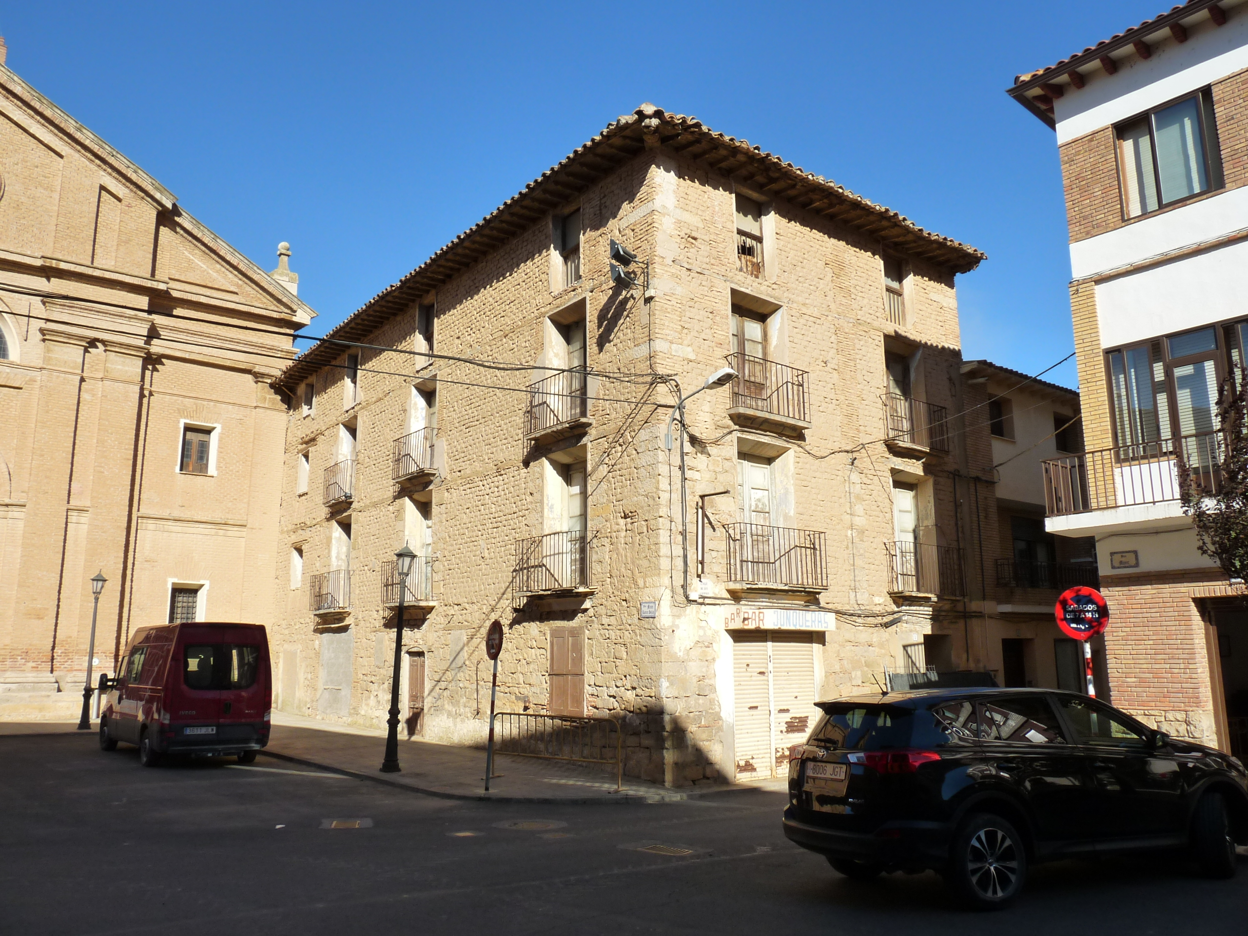 Alcolea de Cinca - Plaza Mosén Ramón Salas - Casa Junquera (s. XIX o XX)